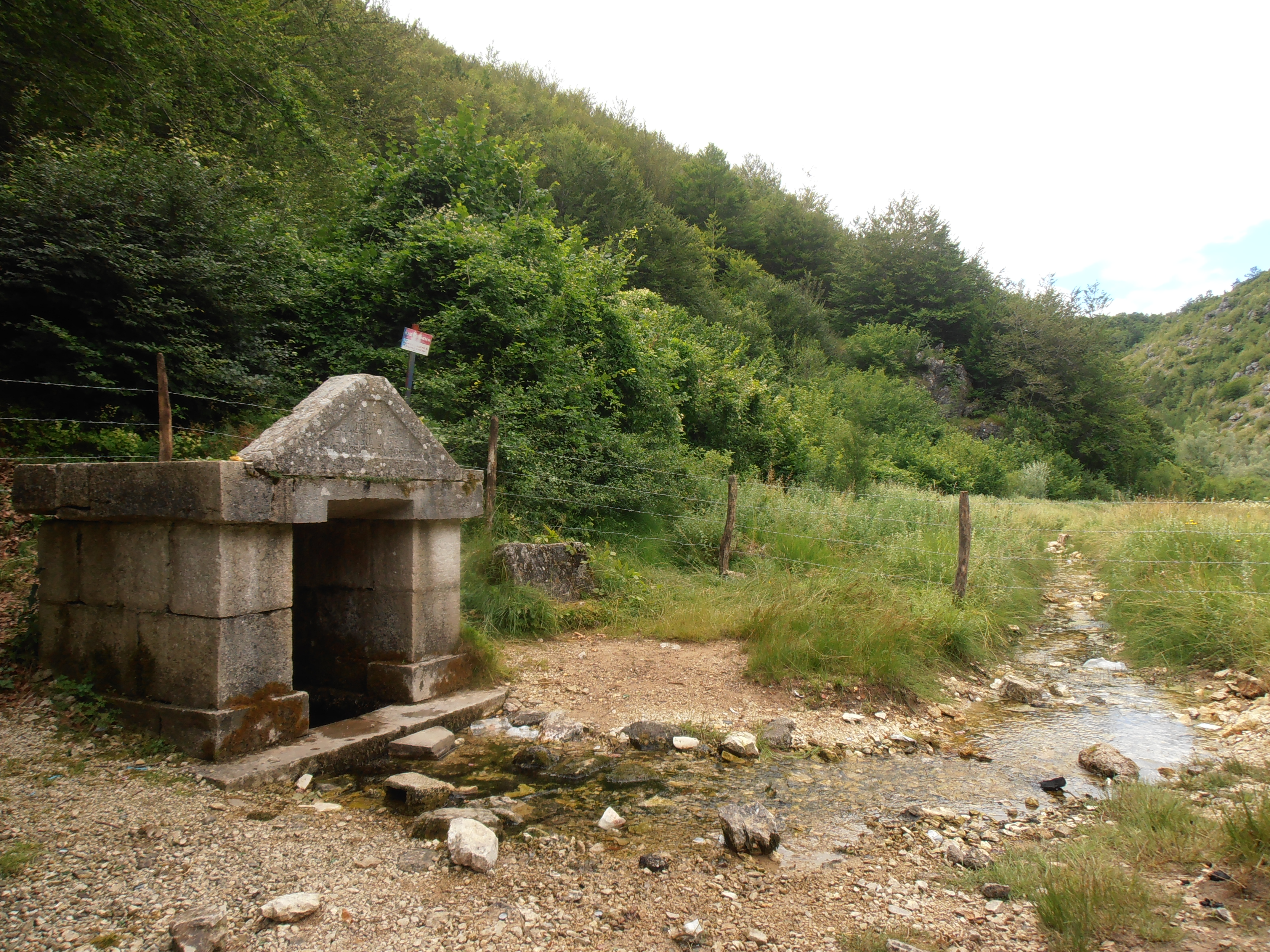 NKD298 Čisti izvori pijaće vode nerjetko su zaštićeni kamenim nastrešicama. Hercegovo vrelo je jedno od najpoznatijih i najstarijih u okolini Gacka. Na njemu piše ,,1897 popravili Ercegovo vrelo Sokolska četa Fojnice".